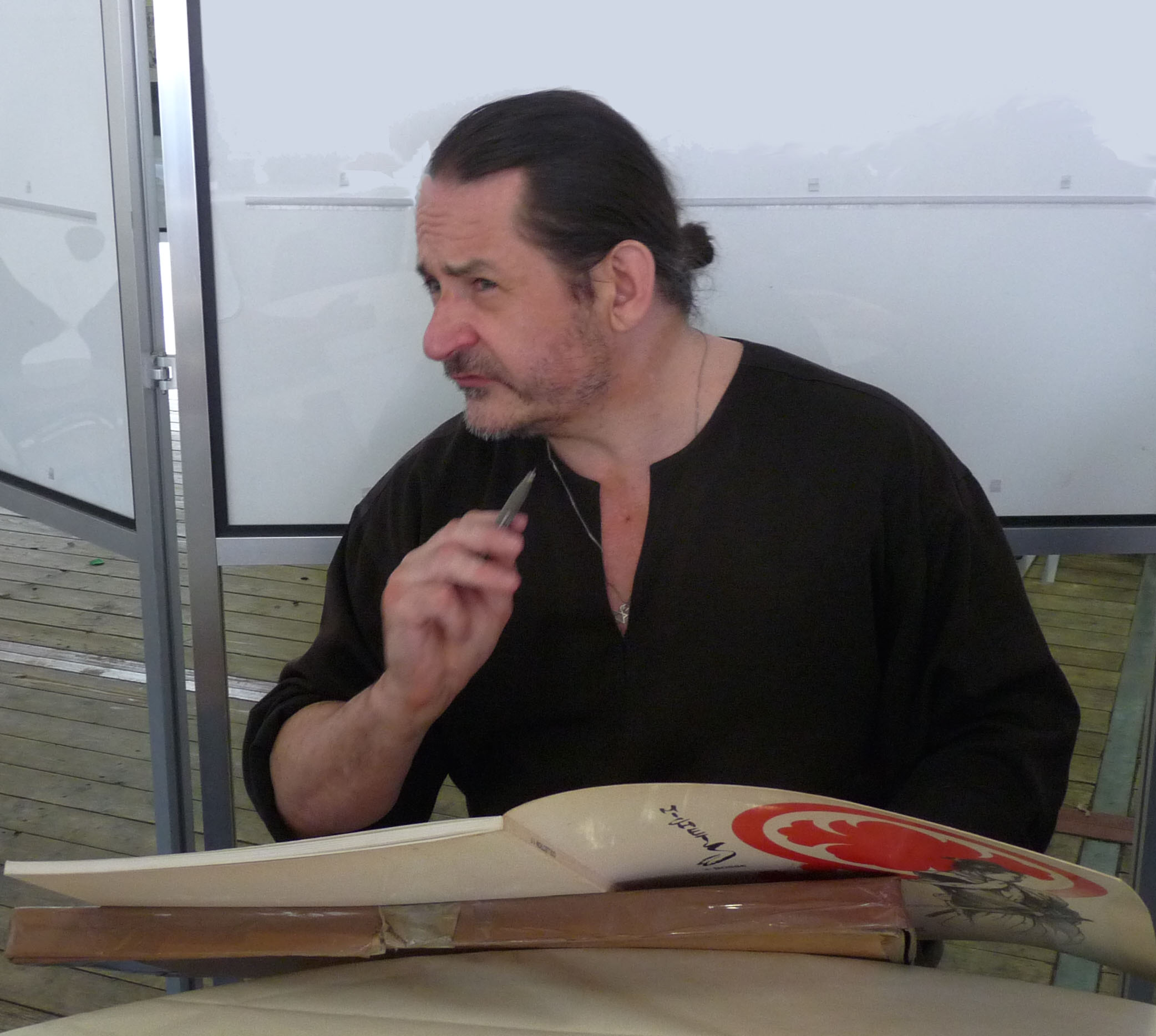 Marc Michetz au Festival européen de la bande dessinée Strasbulles 2009